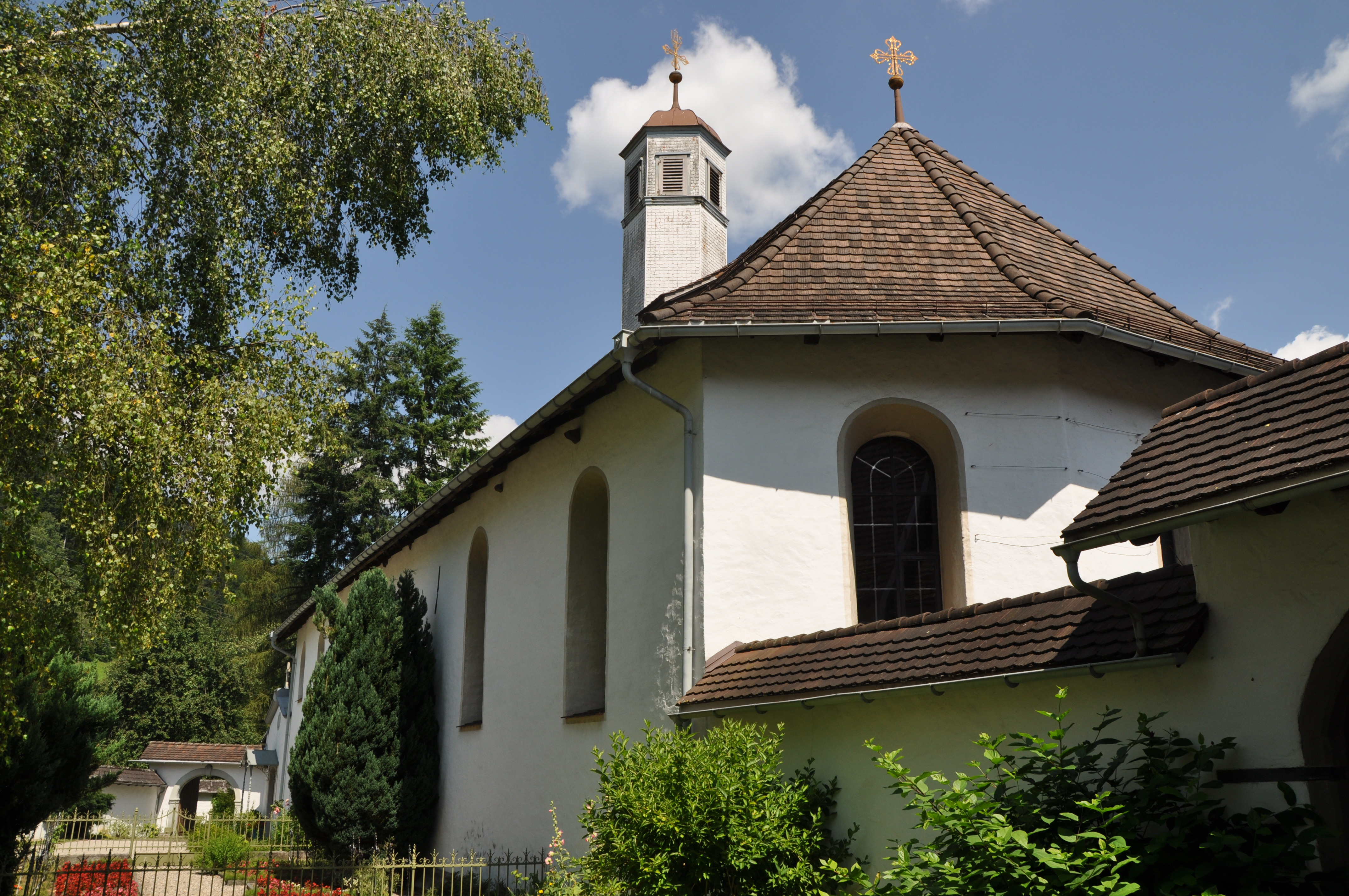 Klosterkirche aussen mit Friedhof